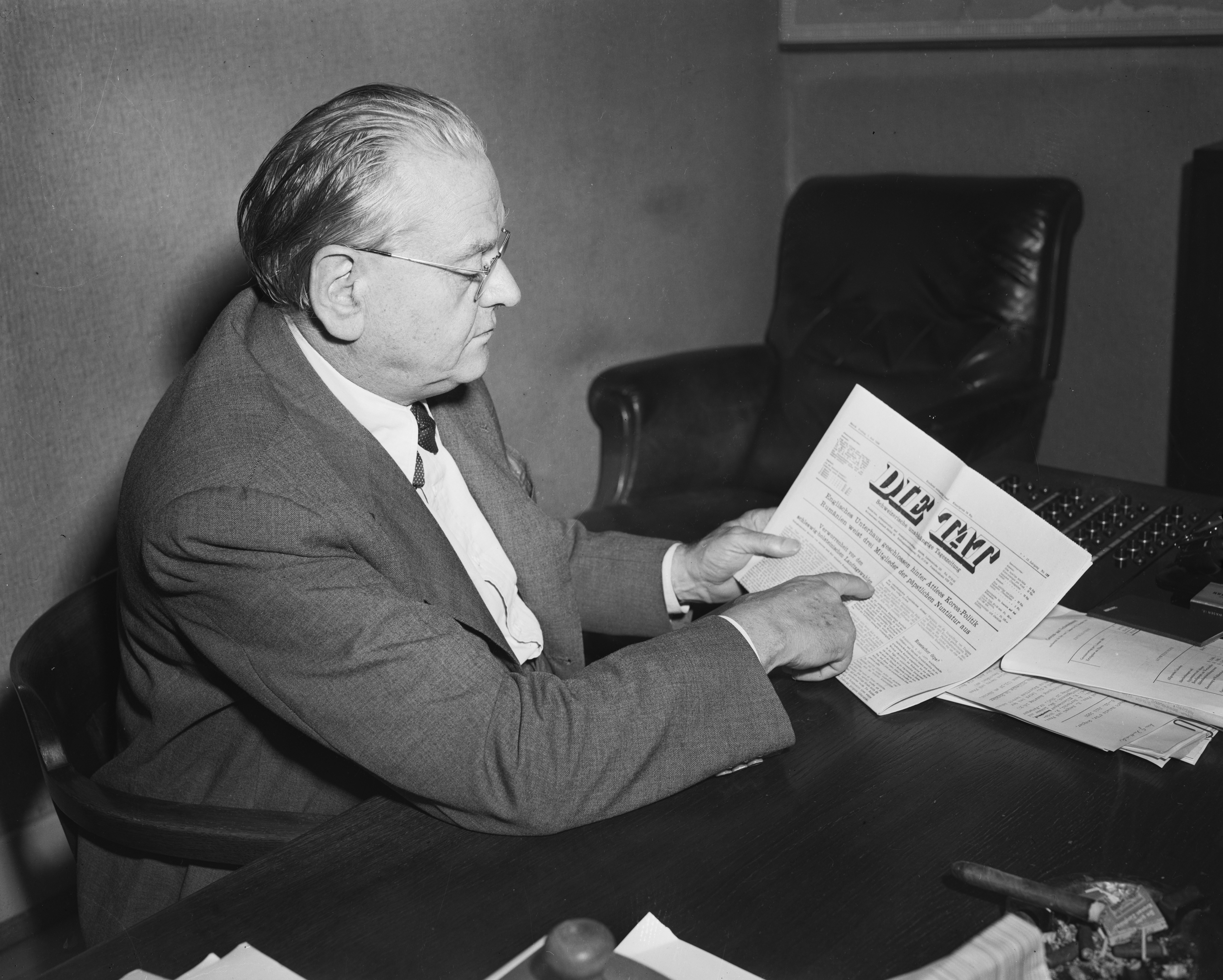 Gottlieb Duttweiler, Gründer der Migros liest die Zeitung "Die Tat"